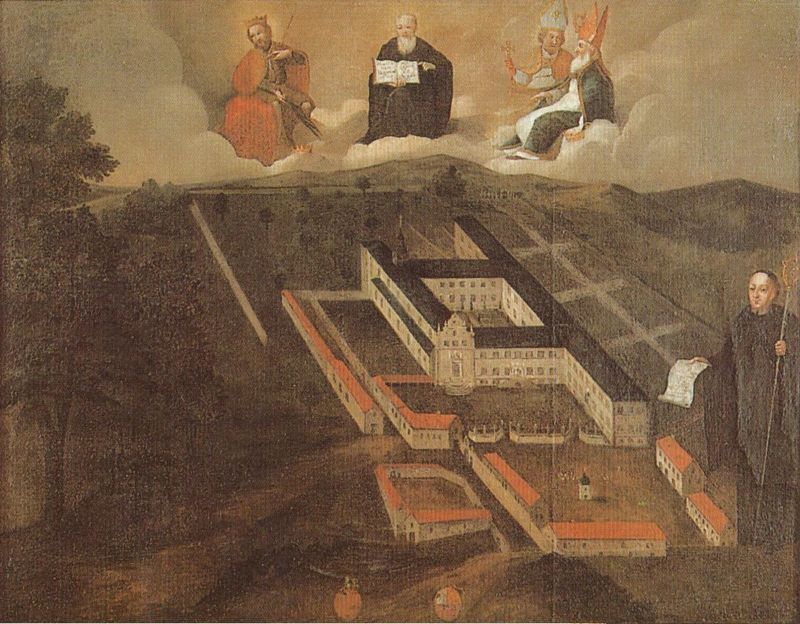 Kloster Ringelheim um 1720 (Das Bild befindet sich heute im Städtischen Museum Salzgitter, Schloss Salder)